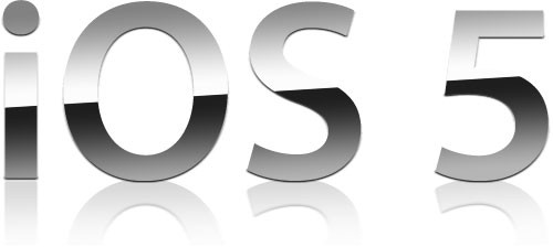 iOS 5 的標誌